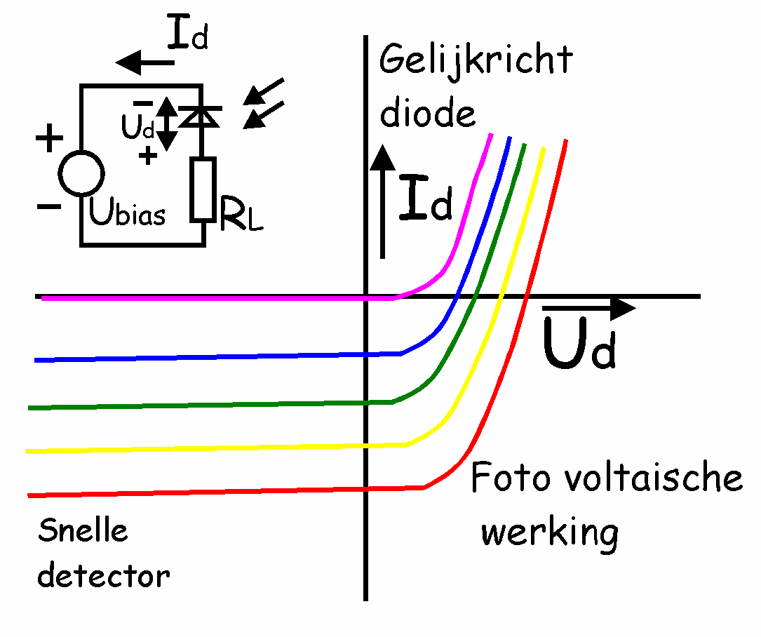 Elektrische karakteristieken van een fotodiode NL tekst